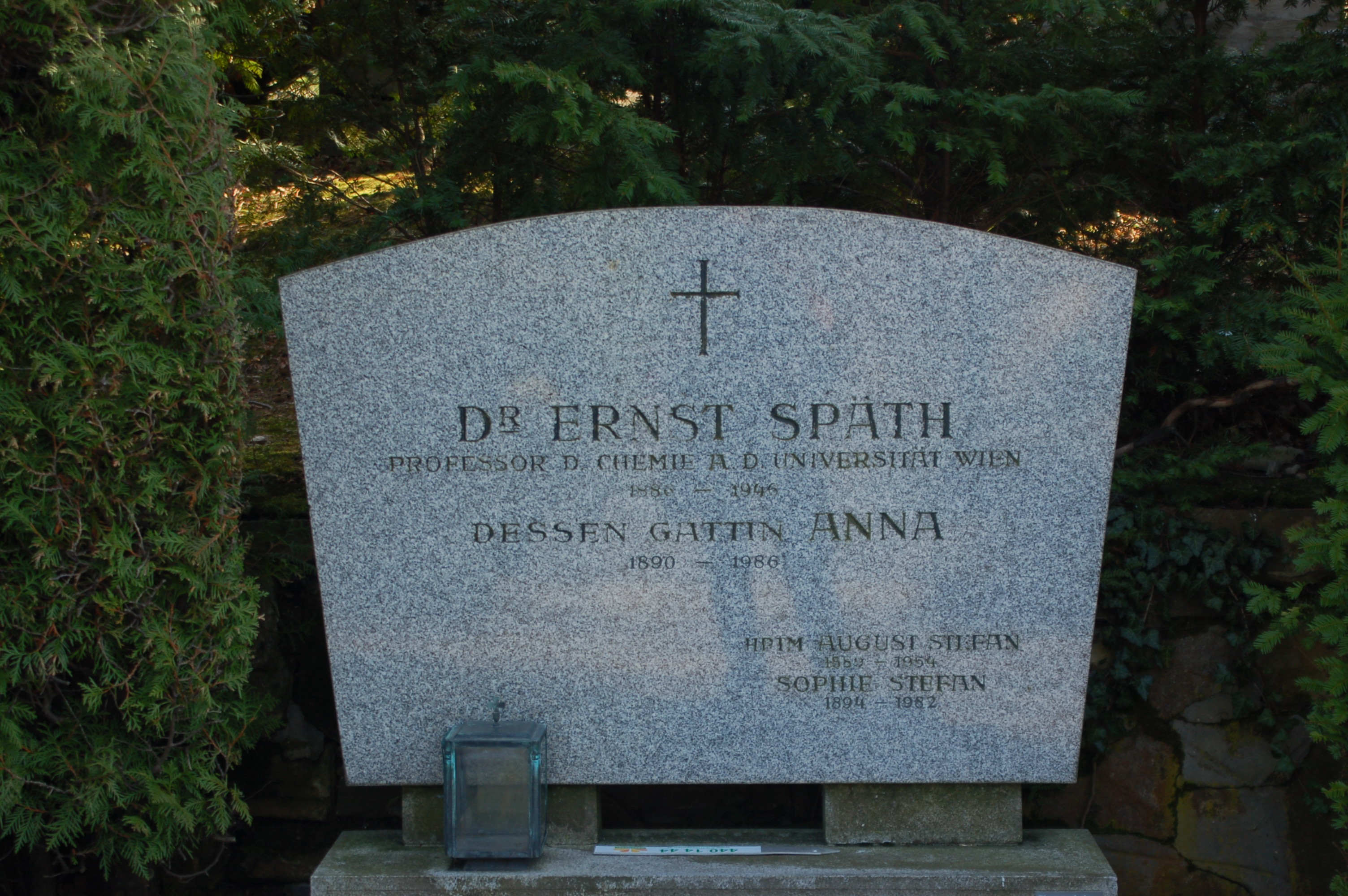 Neustifter Friedhof, Grabstätte von Ernst Späth (Ehrengrab der Stadt Wien)